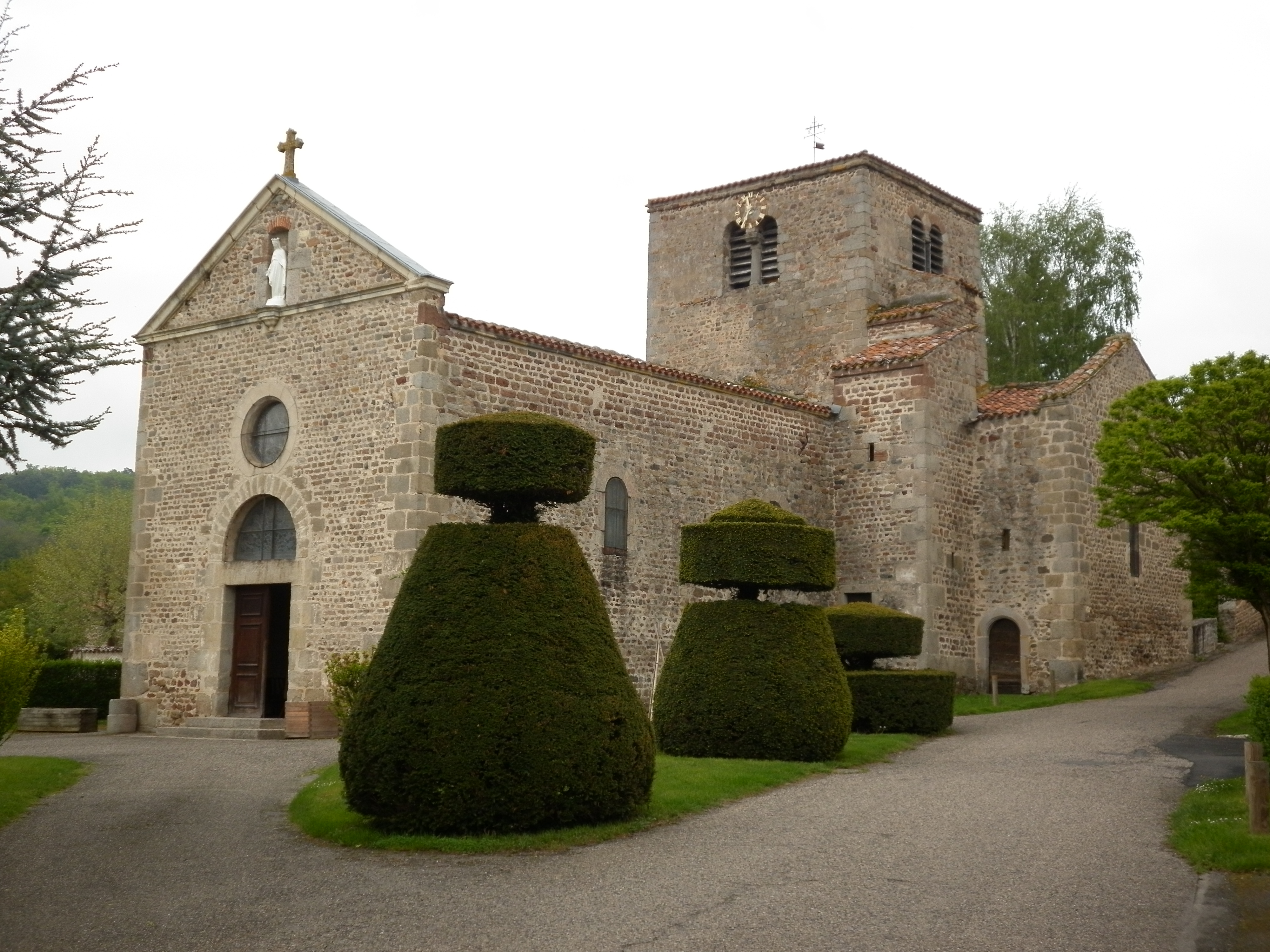 Église de la Nativité-de-Notre-Dame de Salt-en-Donzy